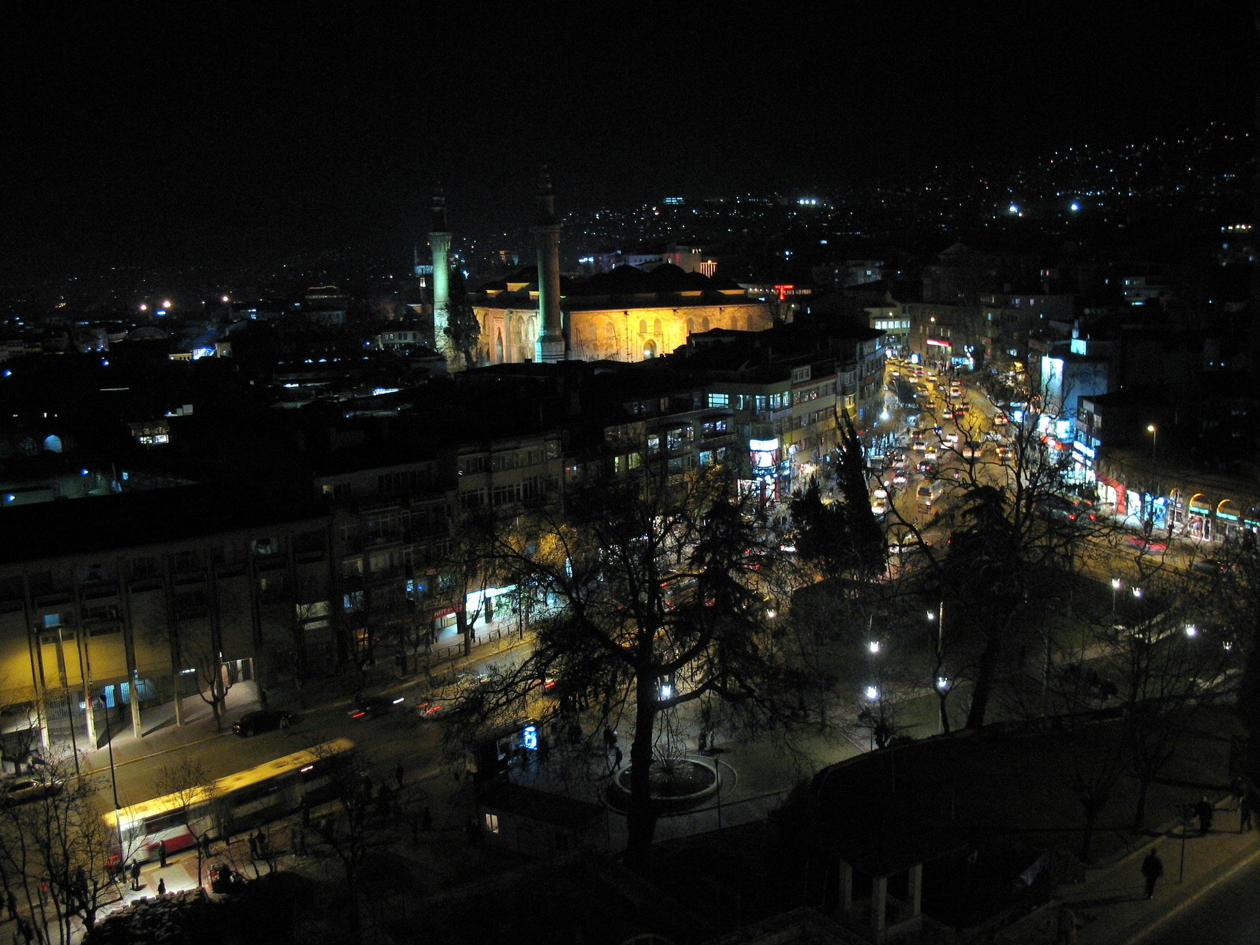 Bursa merkez (Tophane'den Heykel -akşam)